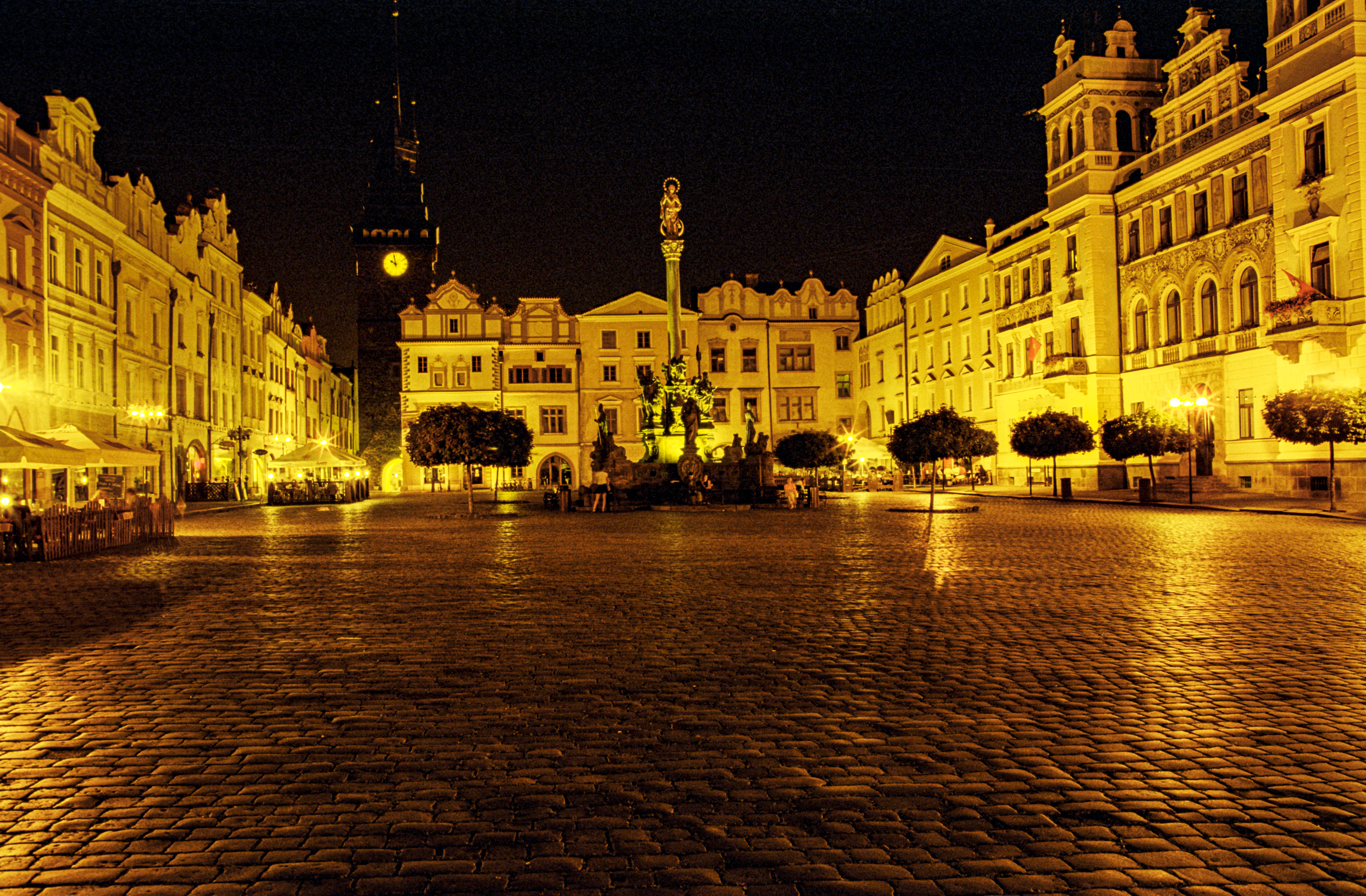 dergleiche bei Nacht.